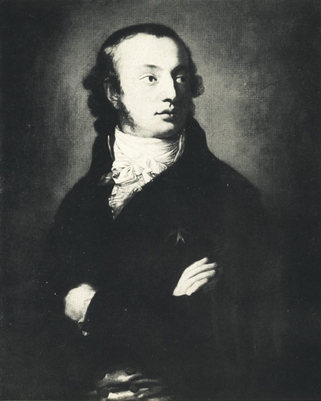 Portrait des Generals Dietrich Freiherr von Miltitz.